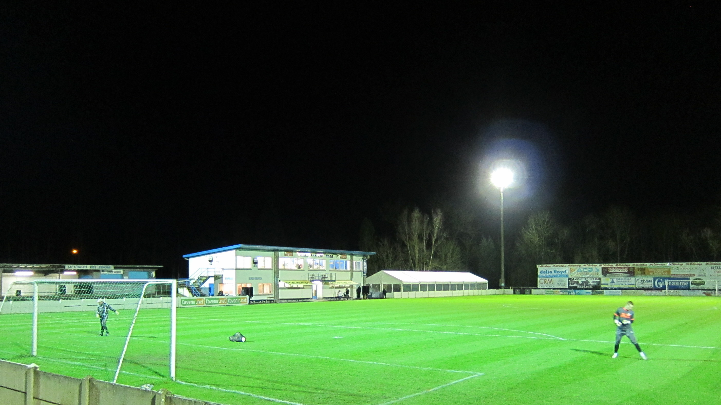 Het voetbalstadion van RU Walonne Ciney, Ciney België